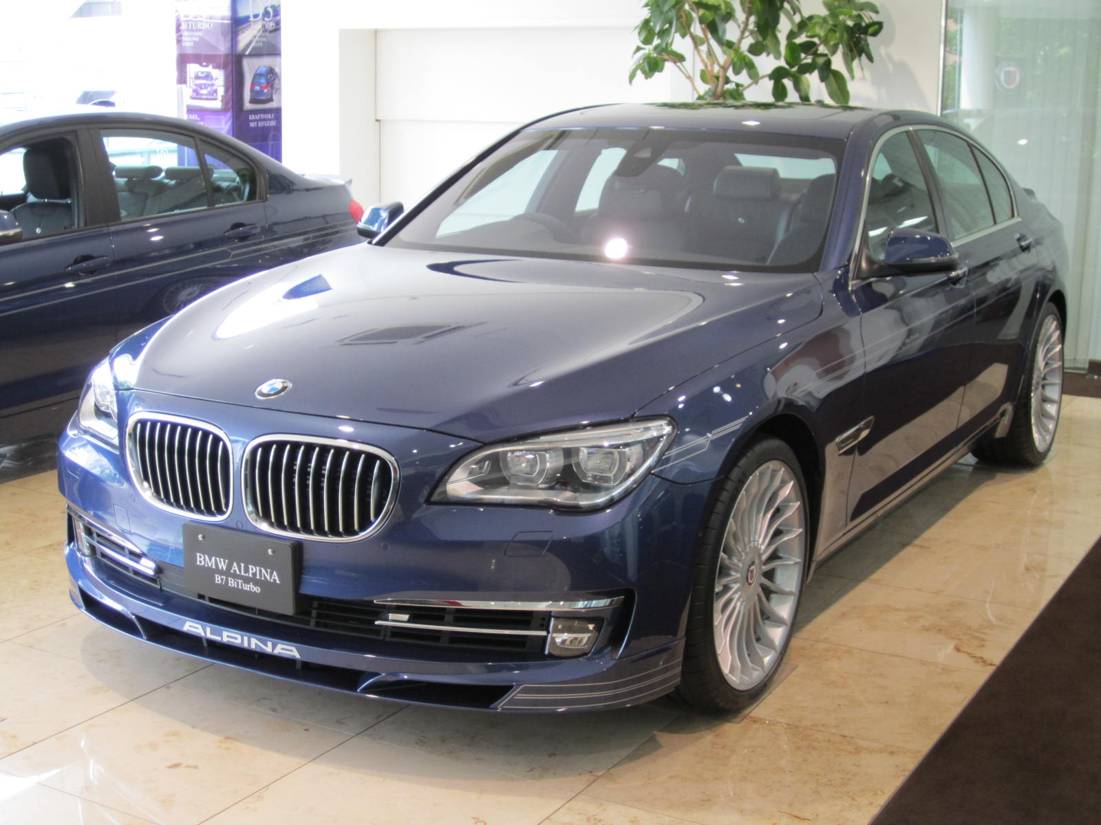 B7Limousine